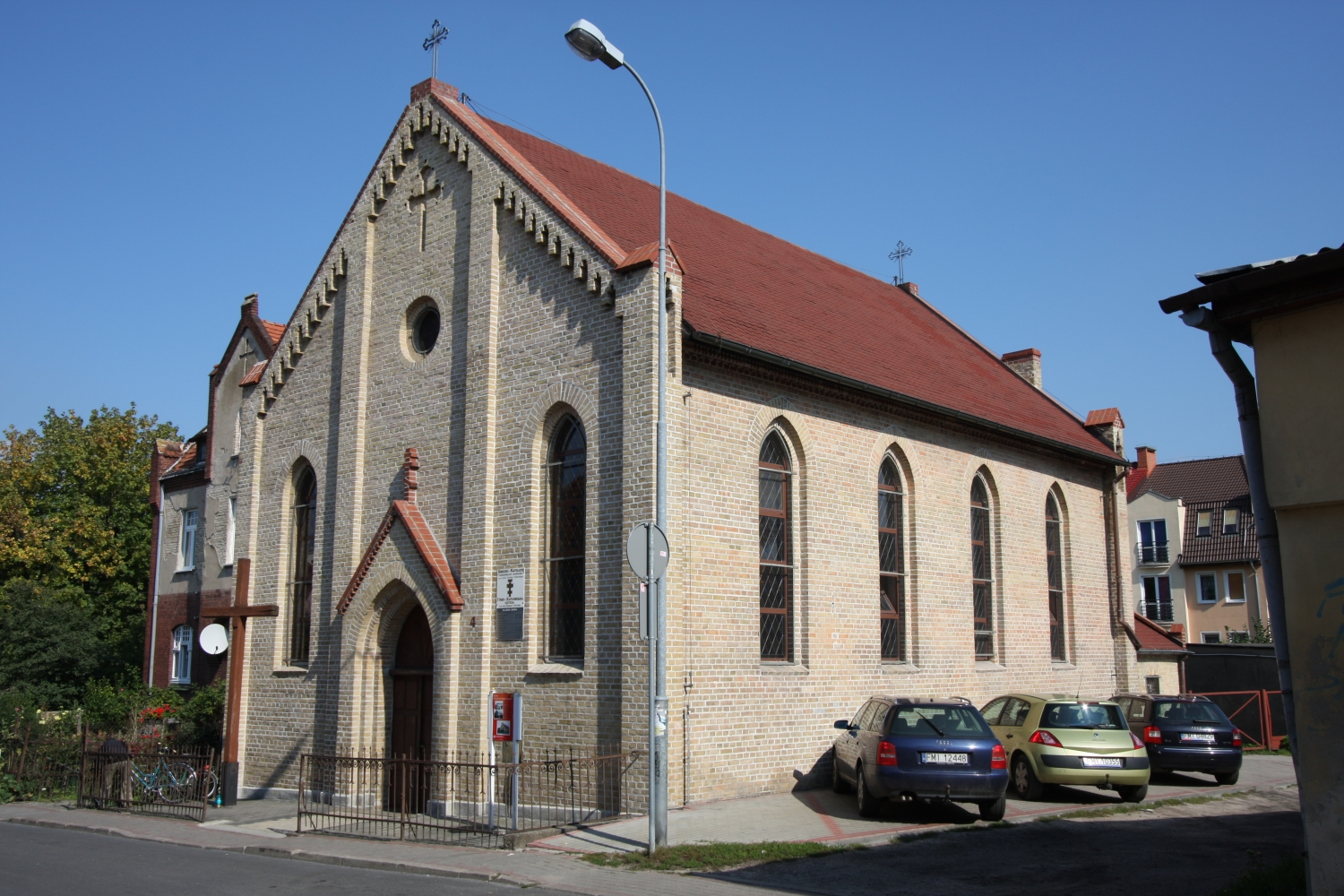 Międzyrzecz, ul. Ściegiennego 4 - dawny zbór luterański, obecnie greckokatolicka cerkiew parafialna pw. śś. Cyryla i Metodego, mur., XIX w. (zabytek nr 431/94 z 27.12.1994)